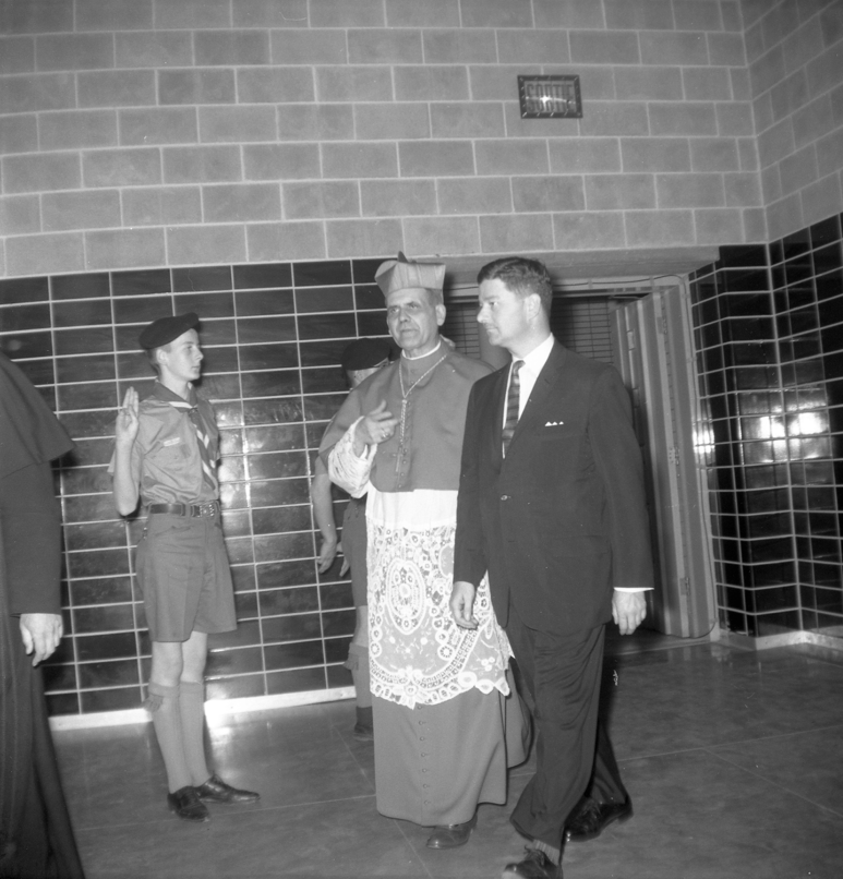 Le cardinal Paul-Émile Léger, archevêque de Montréal, et Paul Gérin-Lajoie, ministre de la Jeunesse du Québec, lors de l'inauguration et bénédiction des nouvelles ailes du Collège Sainte-Croix, à Montréal, le 19 mai 1962.